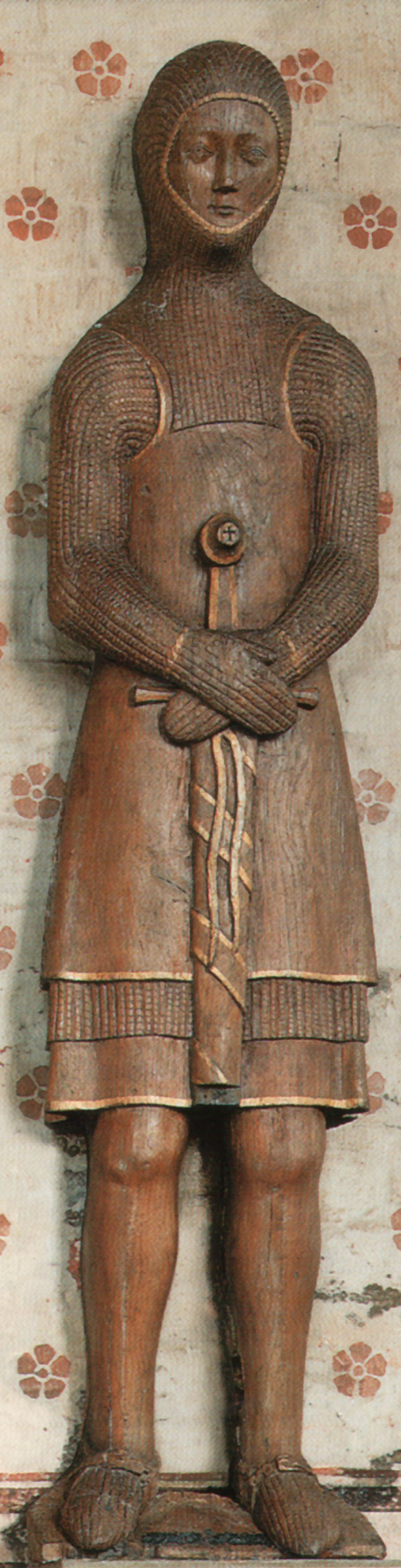 Helmoldus de Plesse Datum: 02.12.2009 Urheber: Kunstwerk ohne Urheberschutz; nach Motivvorlage selbst erstellt Quelle: Motivvorlage